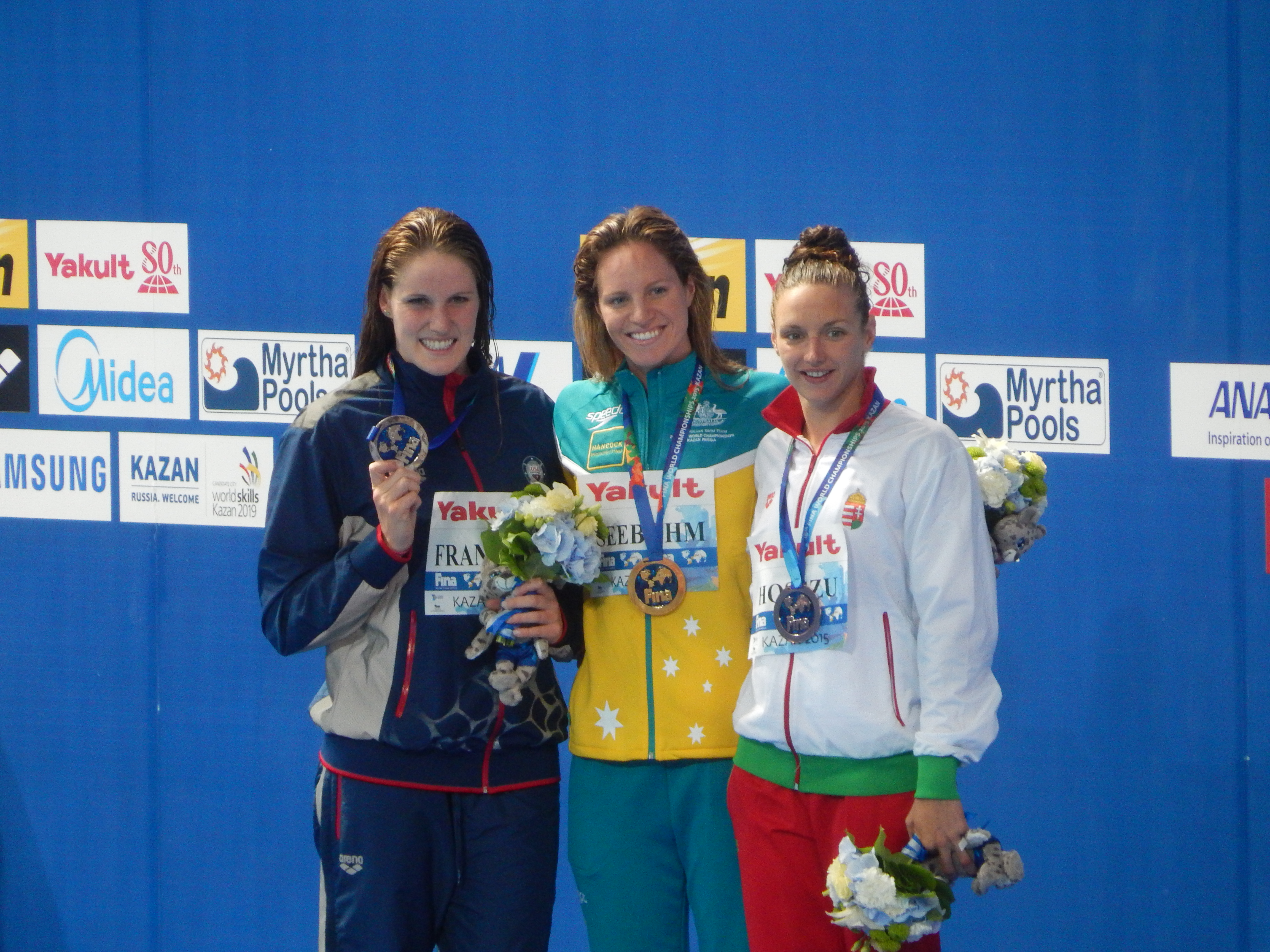 Церемония награждения медалистов на дистанции 200 метров на спине у женщин